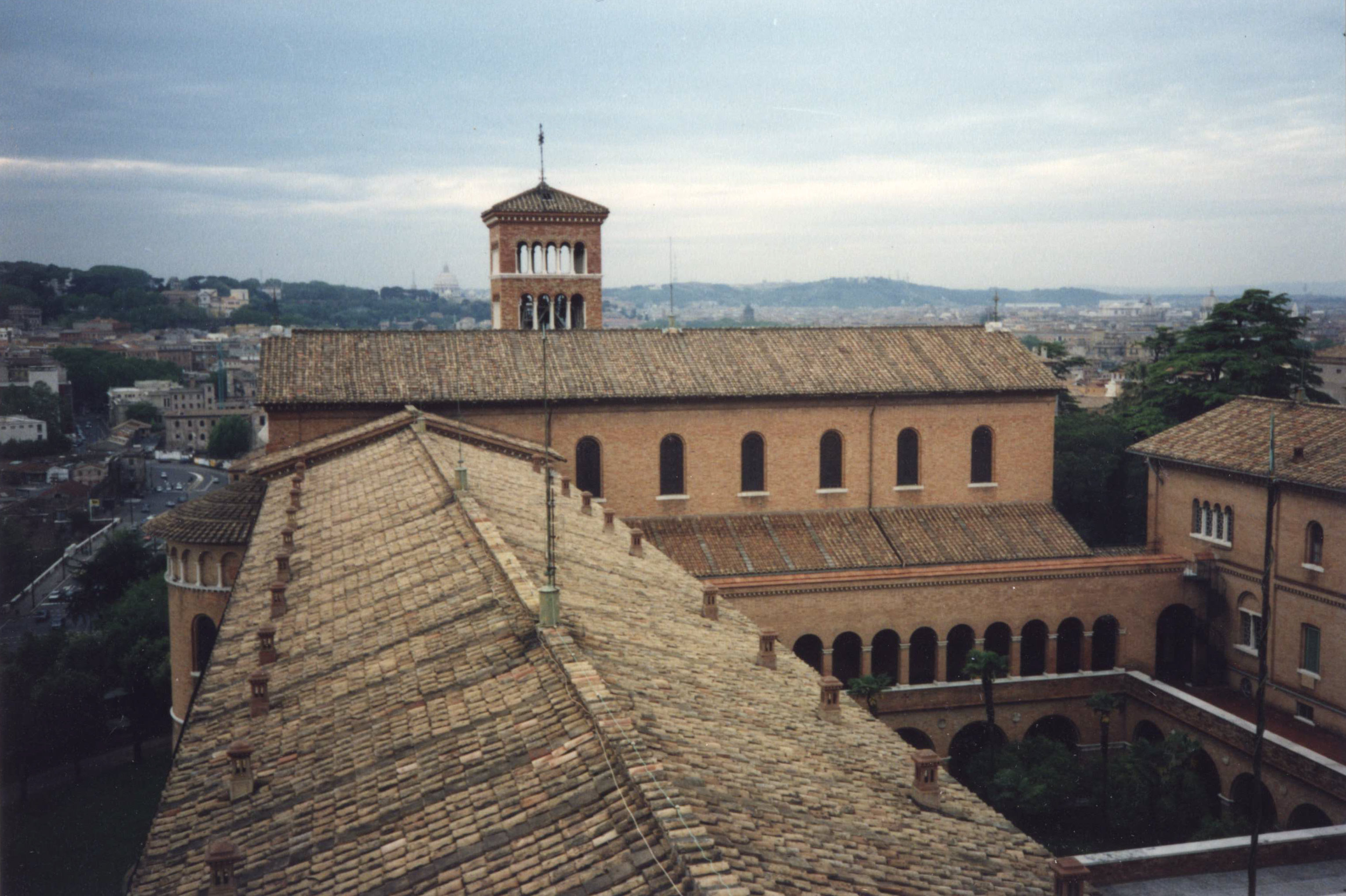 Rom, Ateneo Sant’Anselmo, Blick auf Kirche und Kreuzgang